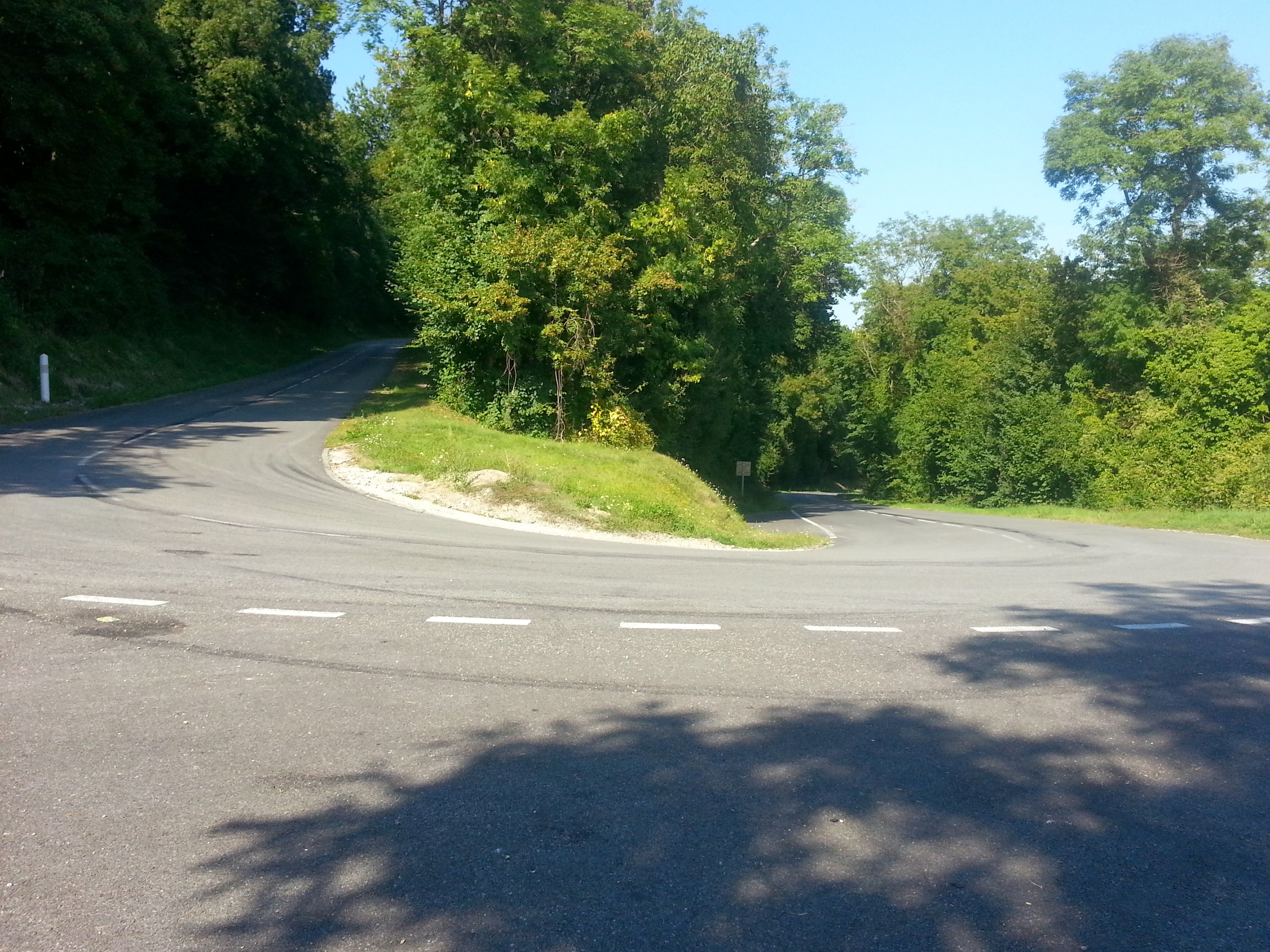 Côte vers Les Andelys (28)